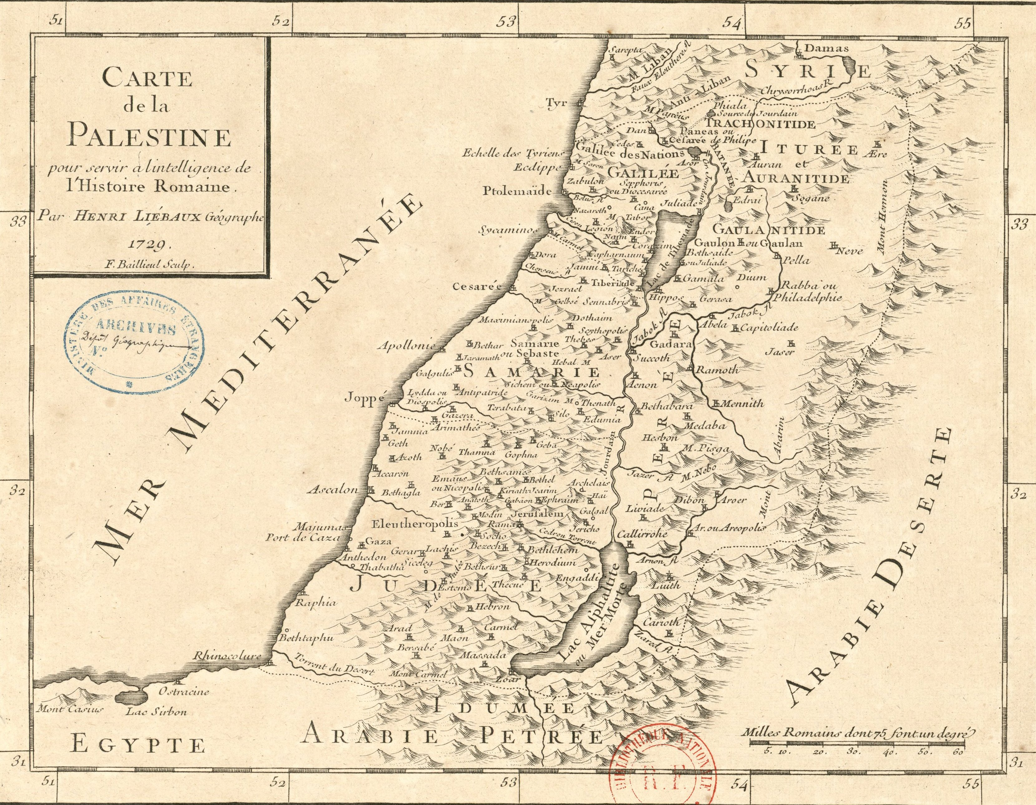 מפת ארץ ישראל וסביבתה, מעשה ידי הנרי ליבו, משנת 1729